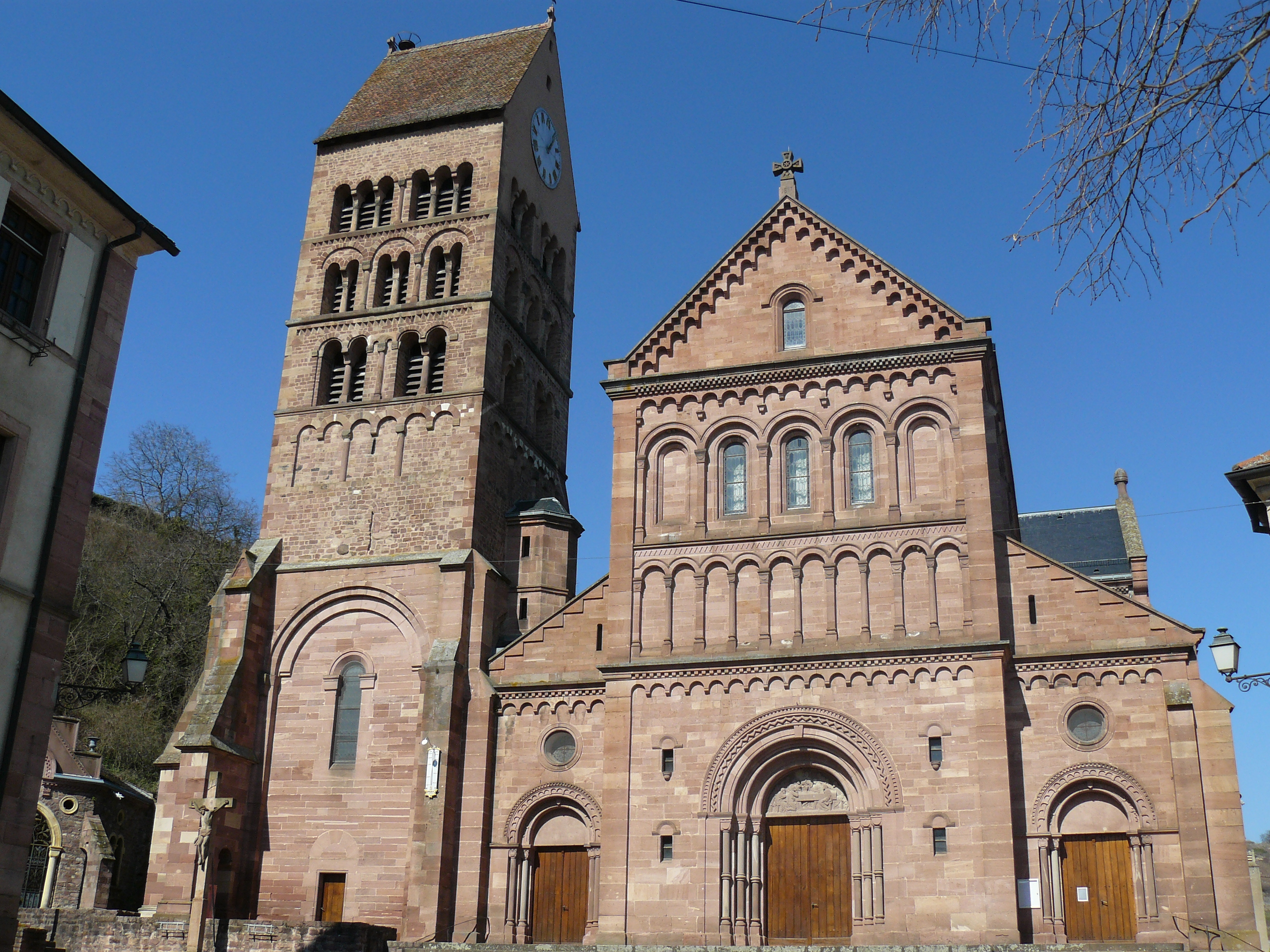 Église Saint-Pantaléon et son clocher roman (Haut-Rhin)